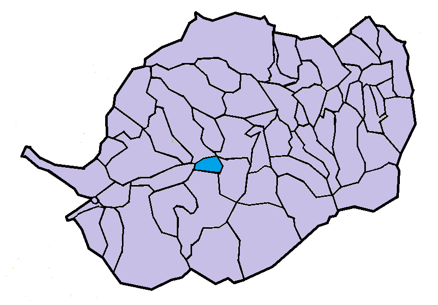 Soanyes en el Conflent, a partir del mapa municipal del Conflent de lliure disposició adaptat al Nomenclàtor toponímic aprovat el 2007